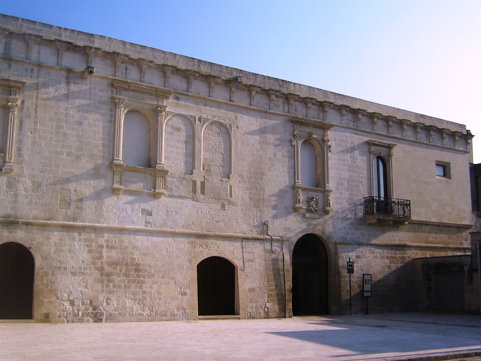 Castrignano de' Greci Castello